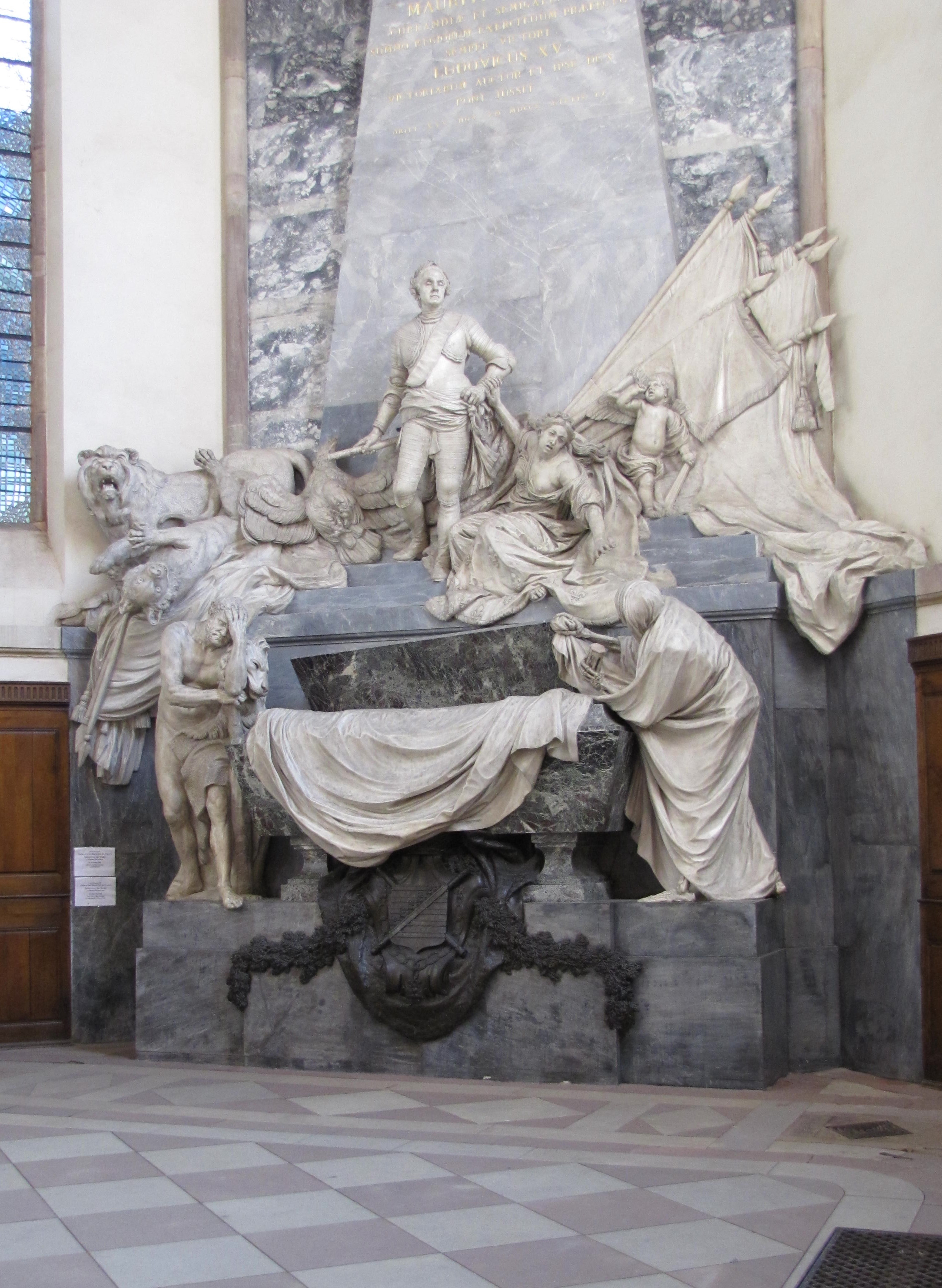 Alsace, Bas-Rhin, Église protestante Saint-Thomas de Strasbourg, 4 rue Martin-Luther (PA00085032). Mausolée du Maréchal de Saxe par J.B.Pigalle (1777)